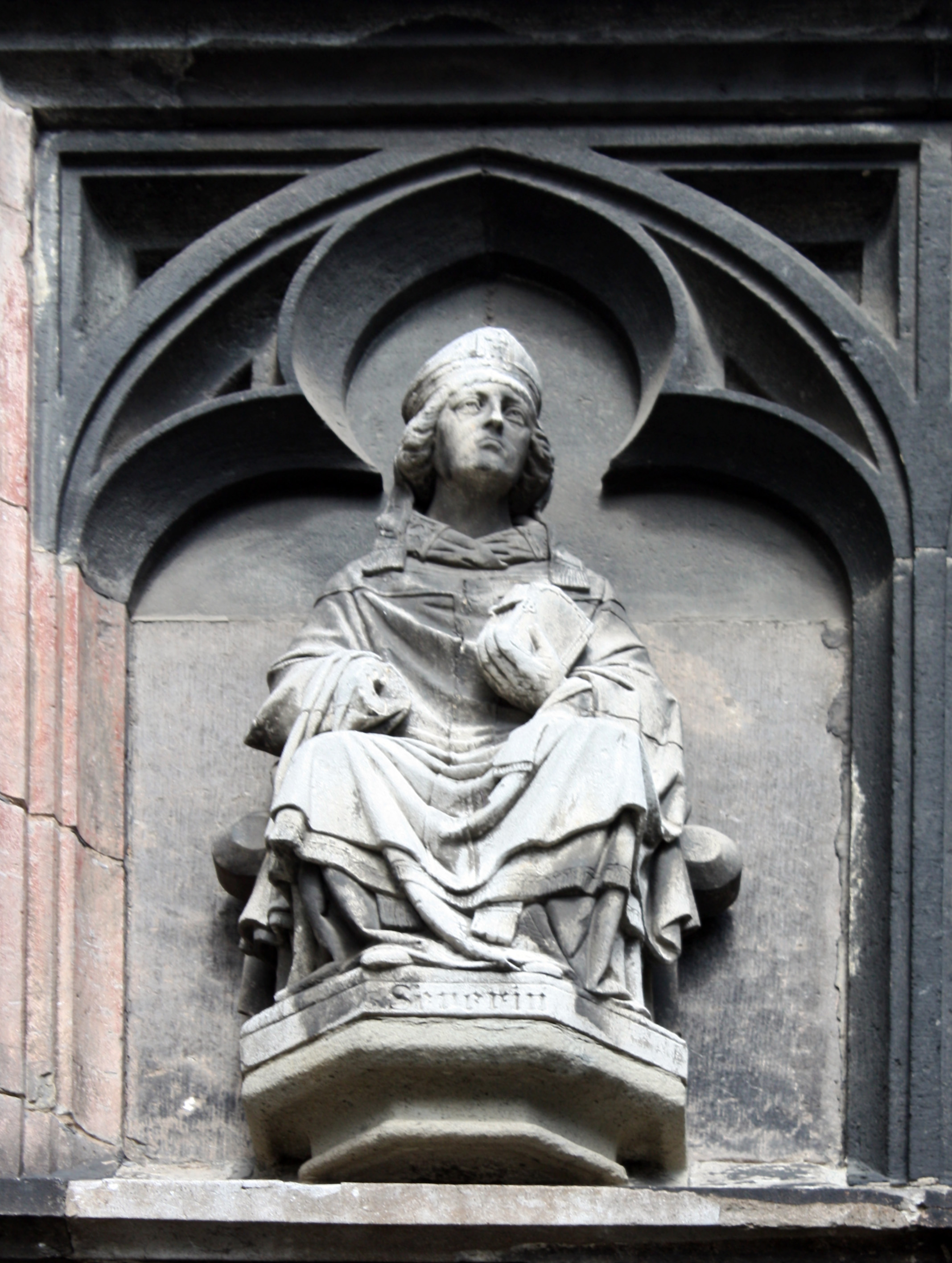 St. Severin Köln. St. Severin Reliefdetail über dem Portal der Kirche. Darstellung des heiligen Severin